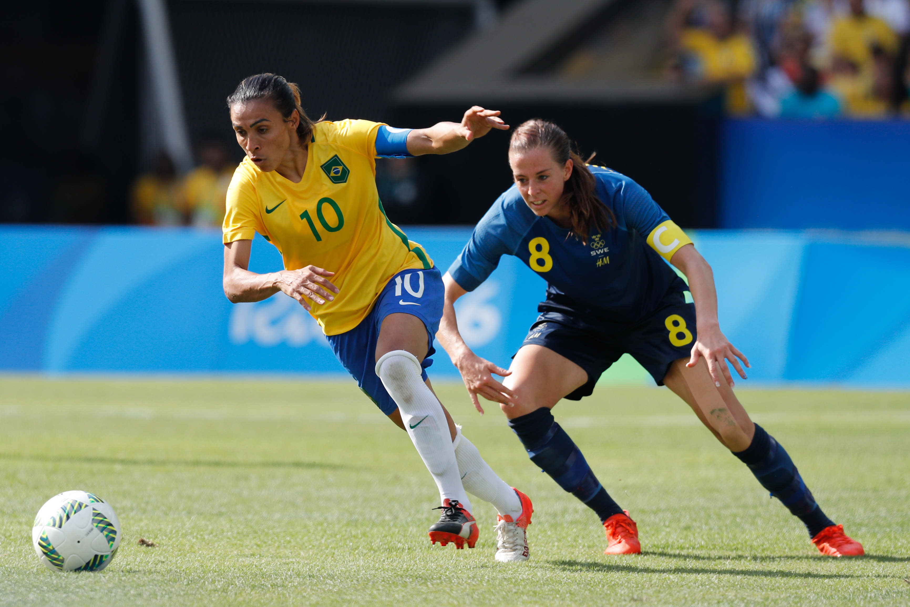 Rio de Janeiro - Seleção brasileira de futebol feminino disputa semifinal com a Suécia, no Maracanã. O Brasil perde nos pênaltis e vai disputar o bronze (Fernando Frazão/Agência Brasil)